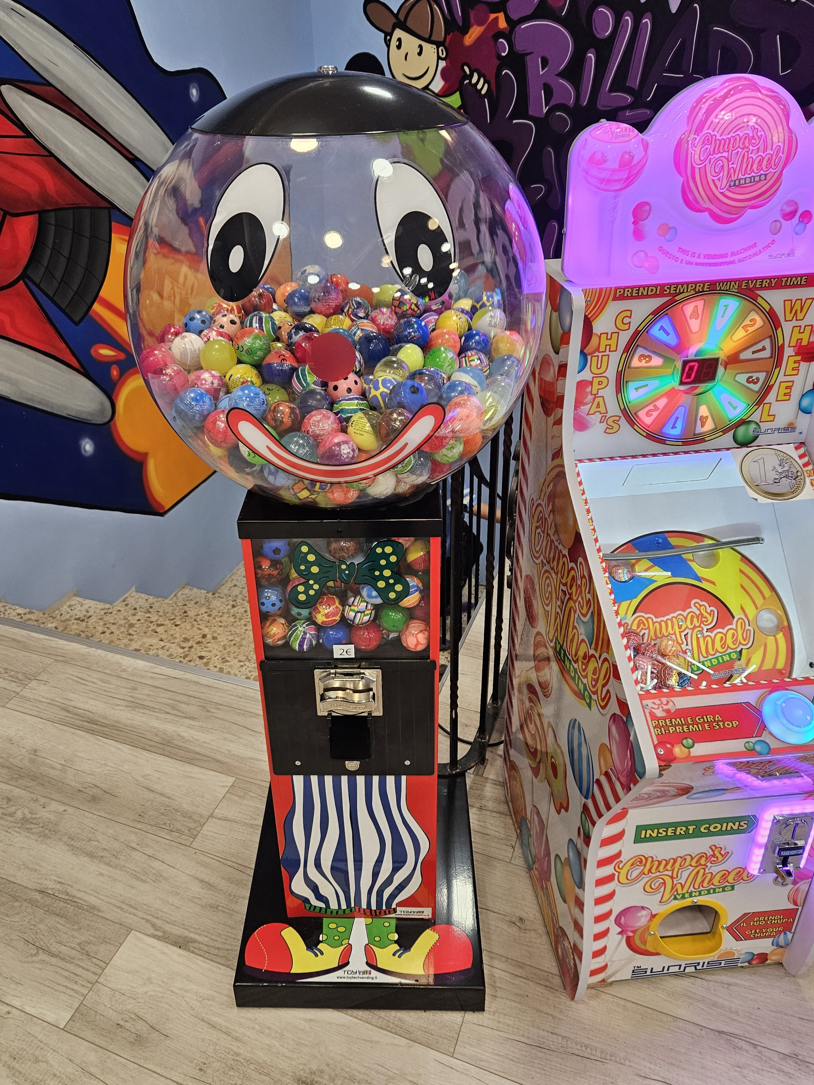 Greifer, Toy Crane machine/claw vending machine, Belgium Westende